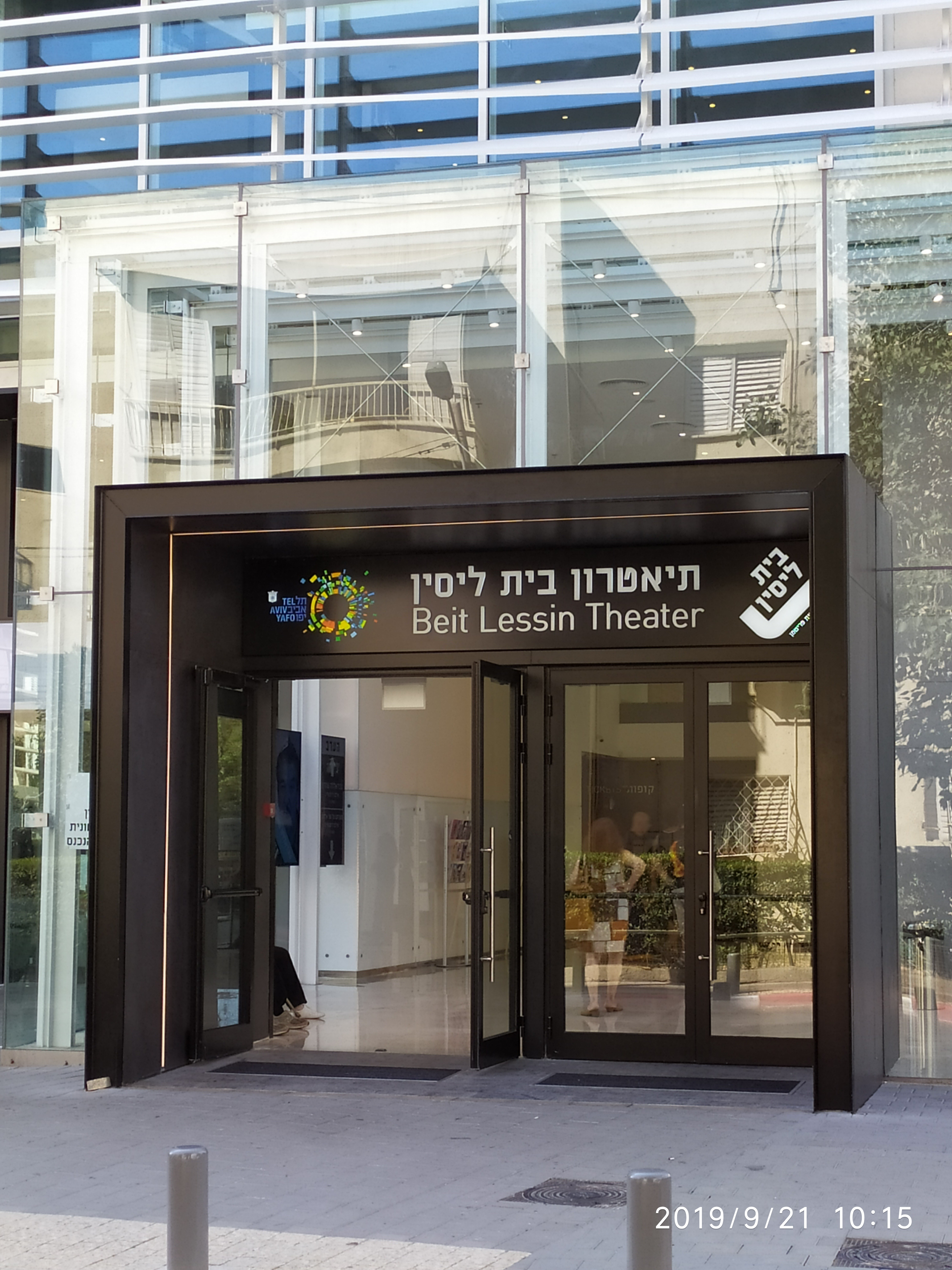 בית ליסין 2019 + כניסה